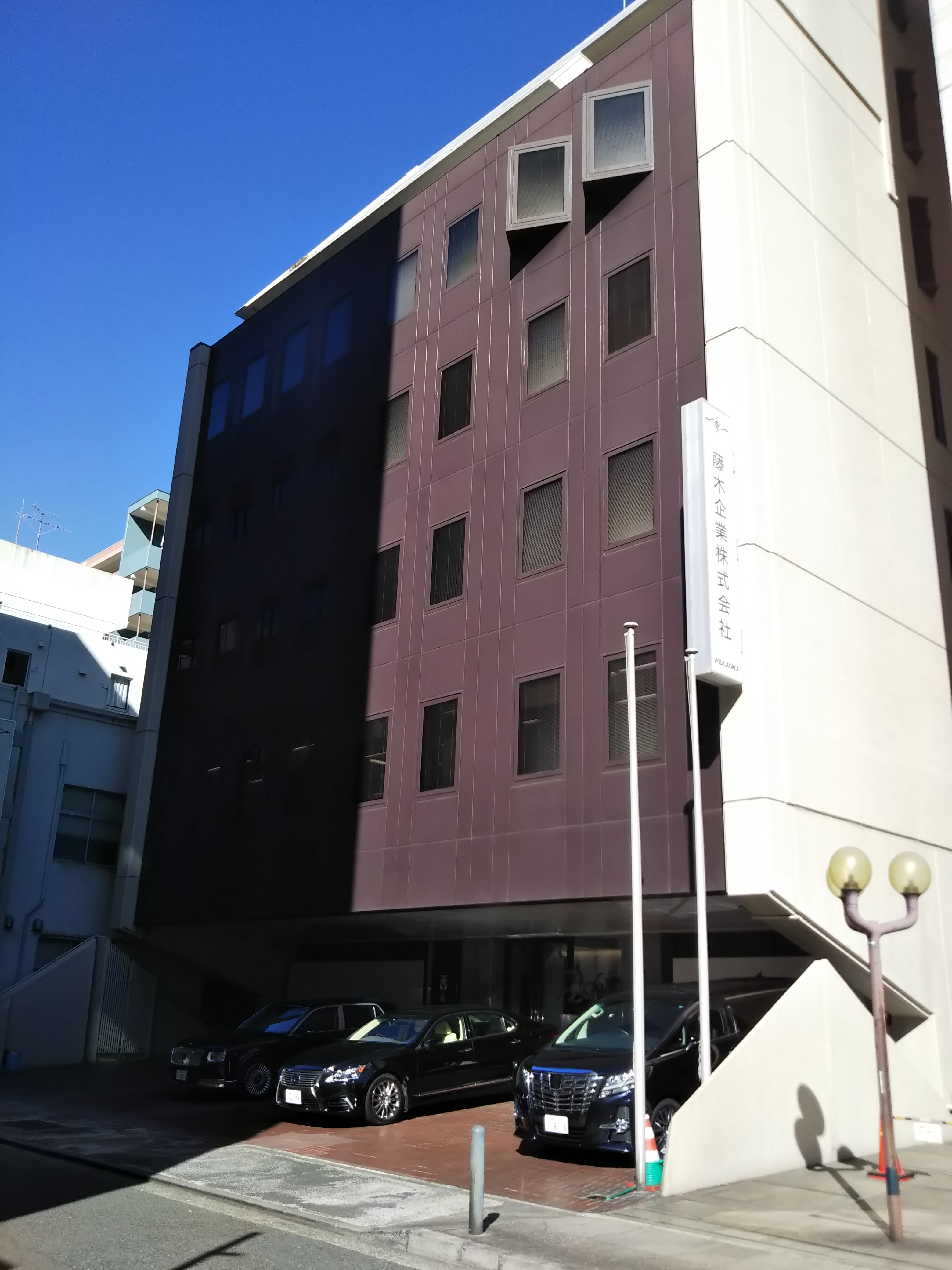 横浜市中区北仲通、藤木企業本社ビル